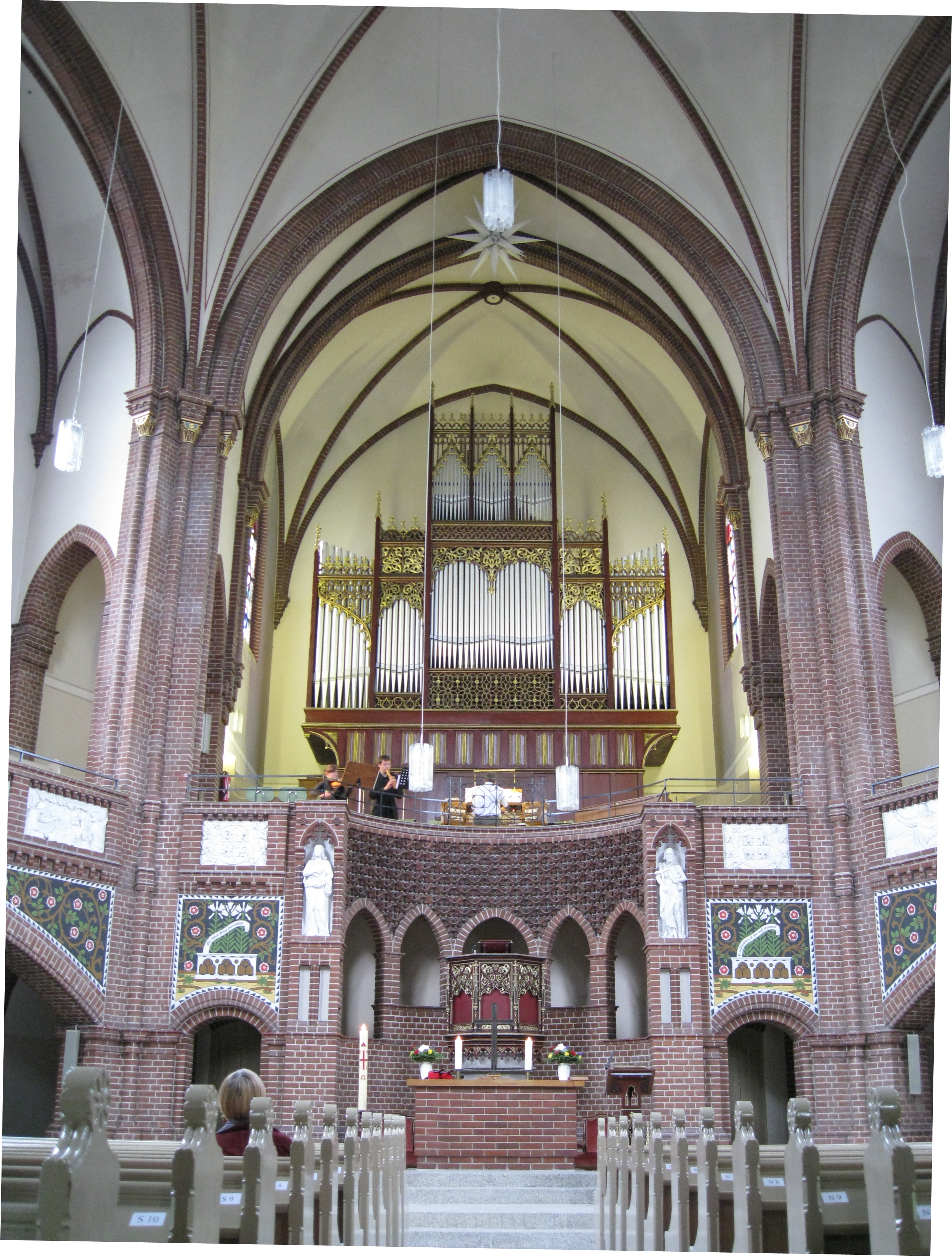 Heilige-Geist-Kirche in Berlin-Moabit, Altar und Orgel gegenüber dem Eingang